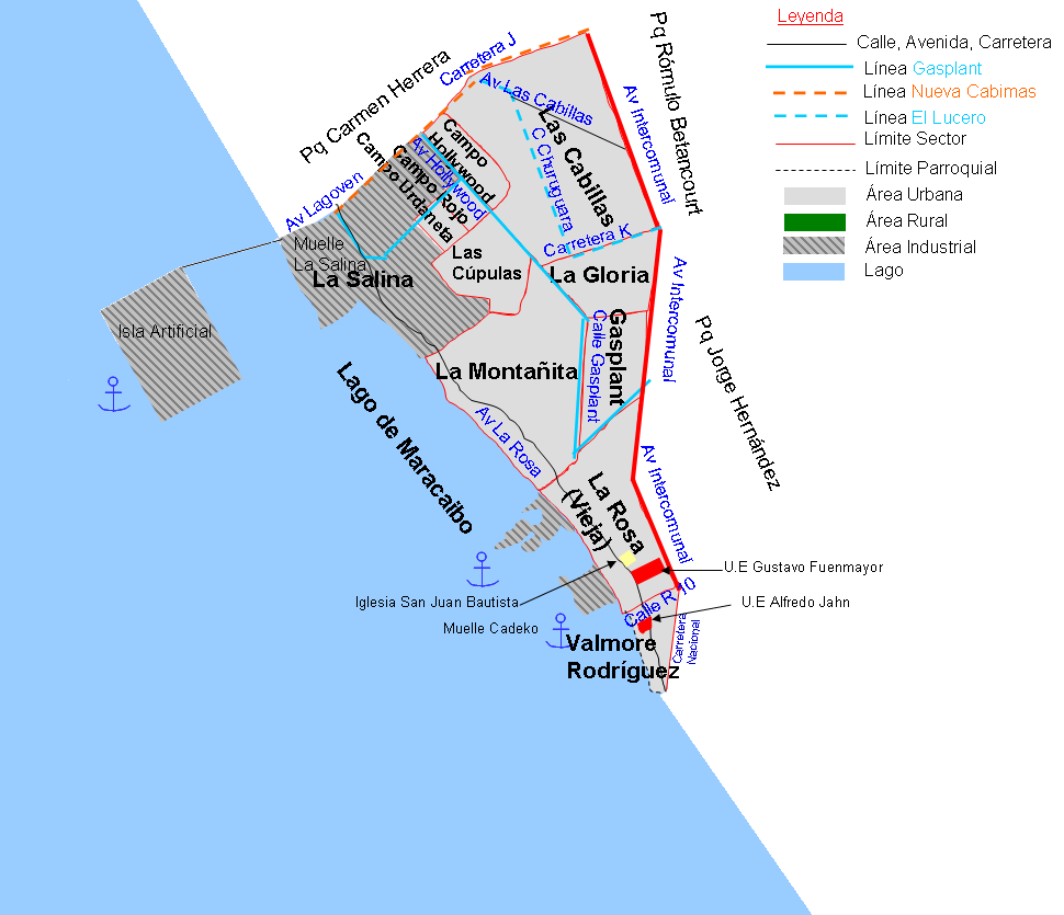 Mapa de la Parroquia La Rosa, Municipio Cabimas, Zulia, Venezuela